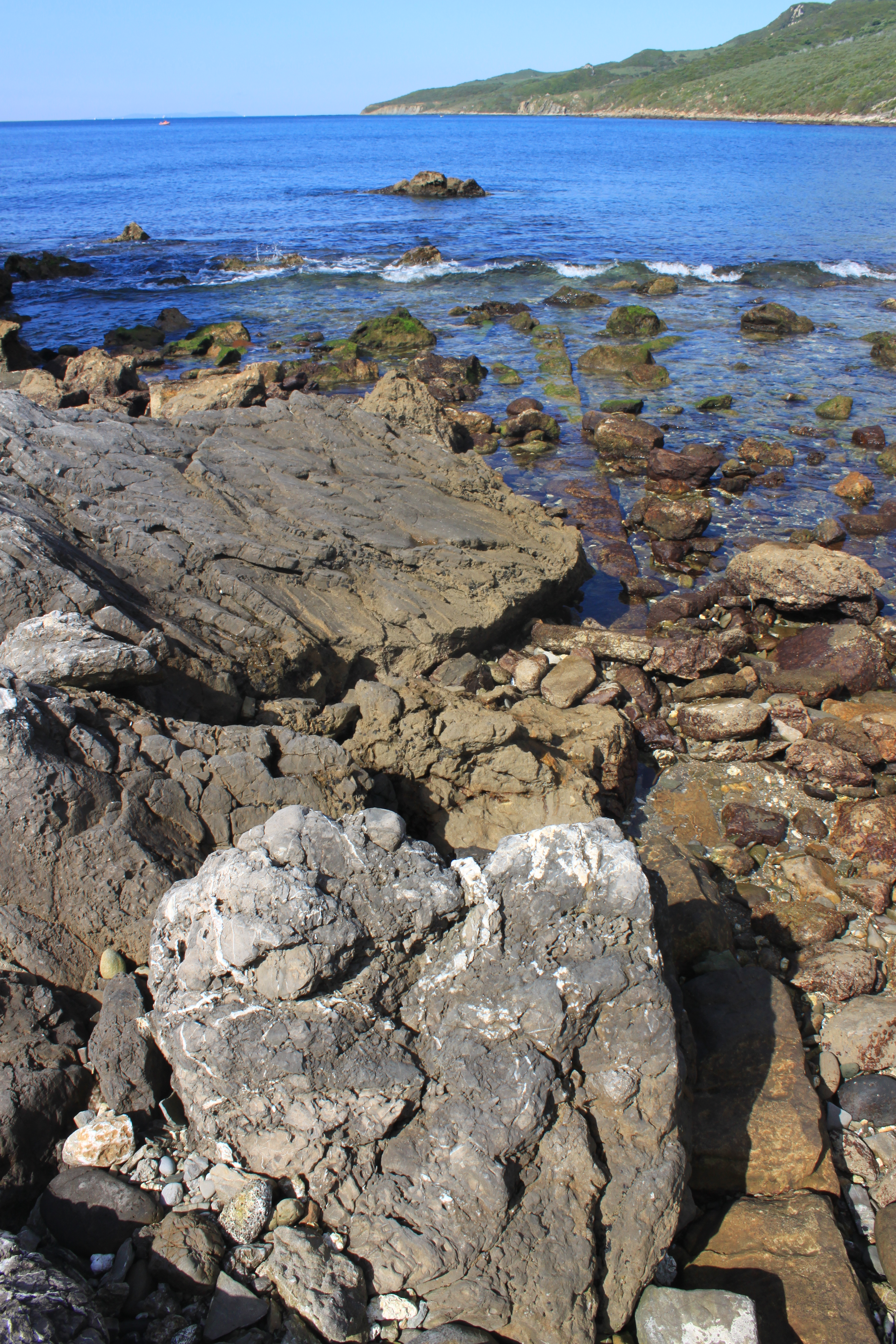 Fuerte de El Tolmo situado en la ensenada de El Tolmo, Algeciras, Andalucía, España. Acantilados situados al sur del fuerte donde se observan los restos del muelle construido para el atraque de embarcaciones. Al fondo la ensenada de El Tolmo y la punta Camarinal.